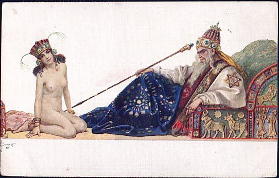 Наложница